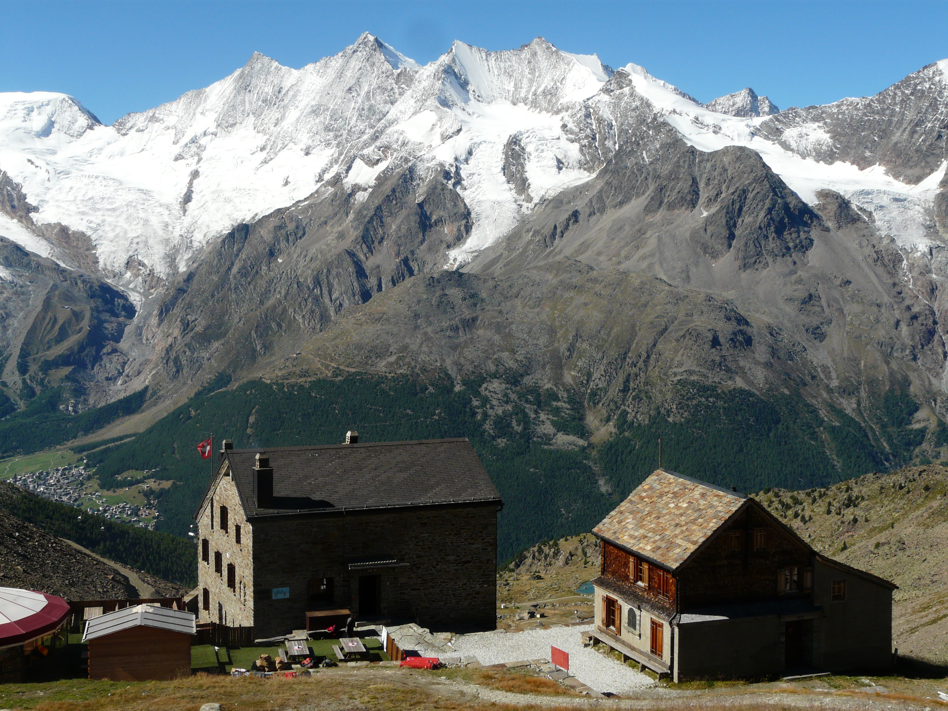 Wiesmieshütte mit Mischabelgruppe: von links nach rechts Täschhorn, Dom, Lenzspitze, Nadelhorn